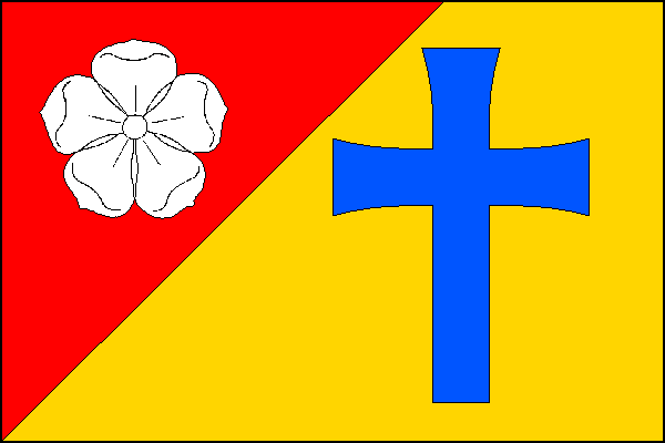 vlajka, Moravec, okres Žďár nad Sázavou